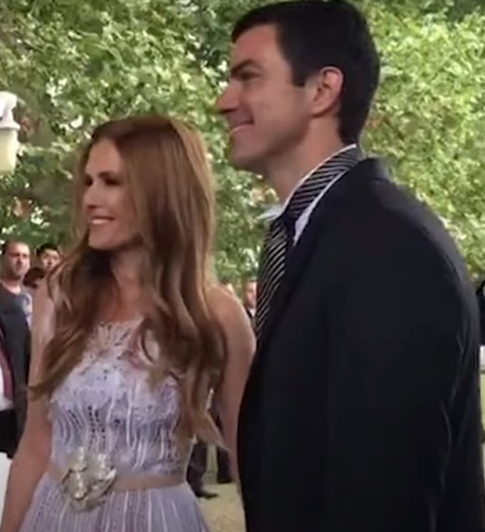 Urtubey y Macedo a los medios durante su casamient